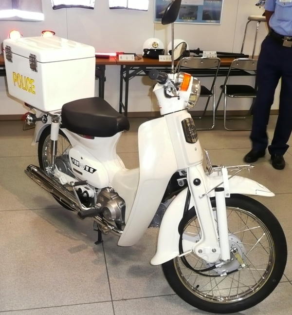 Honda Super Cub 90.